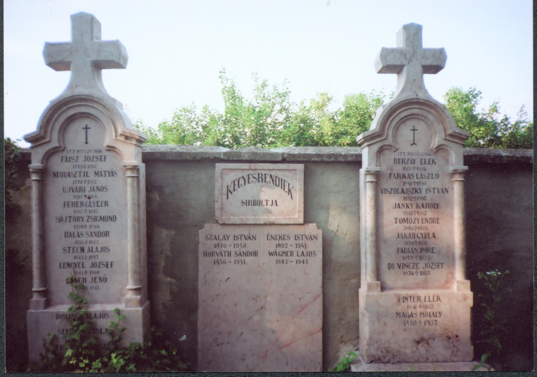 Pintér Elek sírja a tatai Környei úti temető piarista kriptájában van elhelyezve.